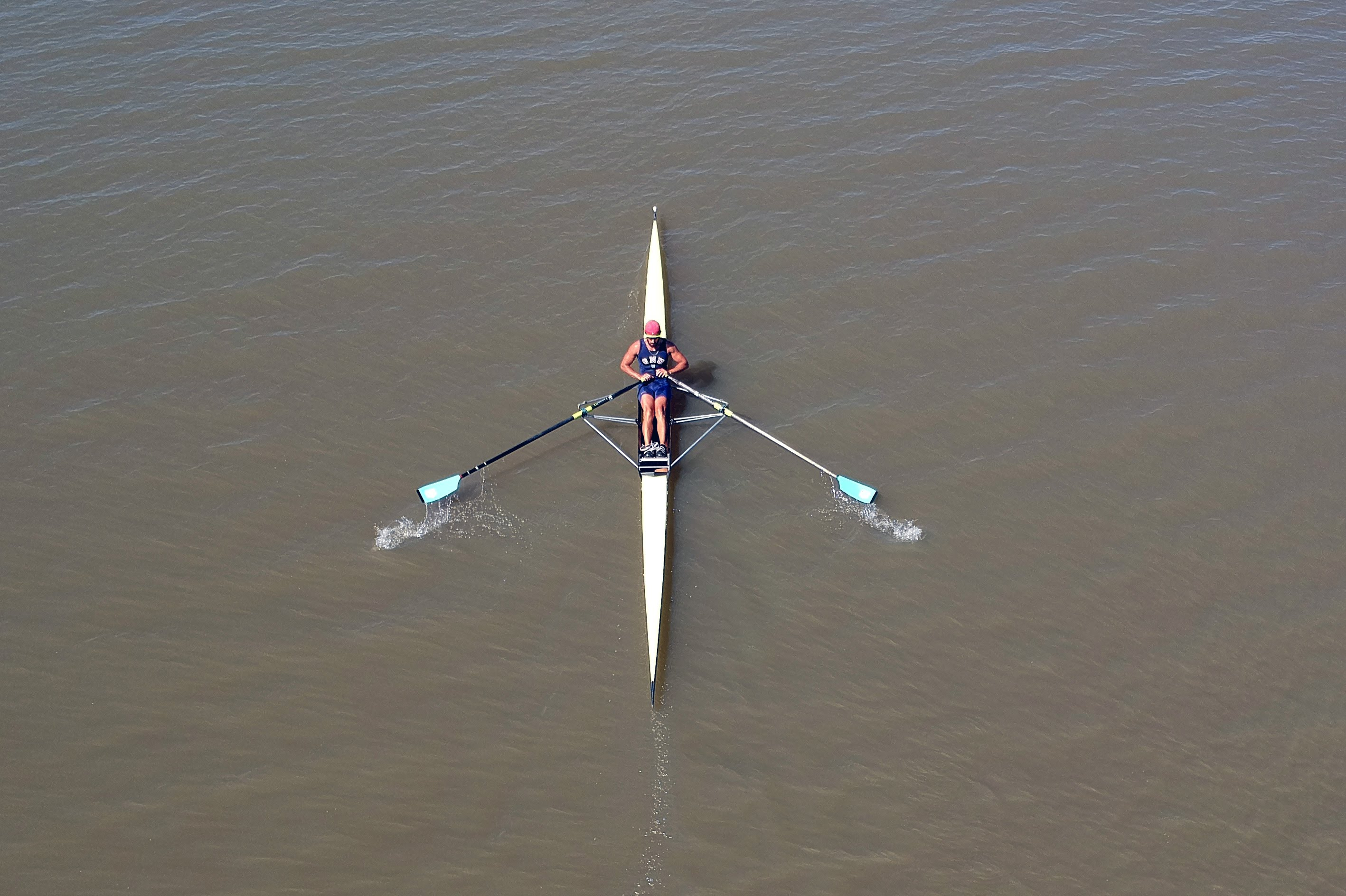 Atleta do Grêmio Náutico União treinando no lago Guaíba na cidade de Porto Alegre em um barco simples (single skiff - 1x)